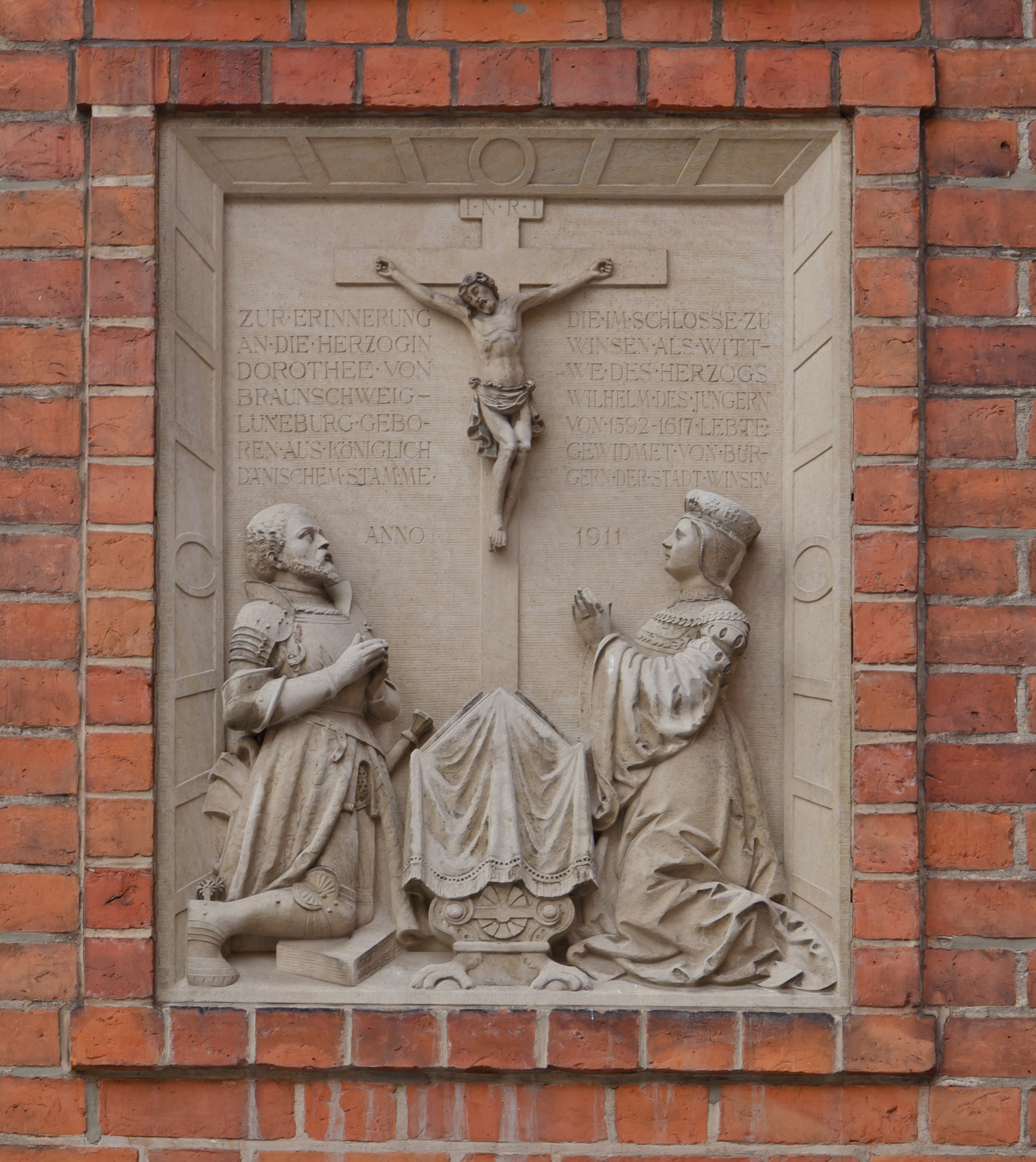 Winsen Schloss Epithaph Dorothee von Braunschweig-Lüneburg